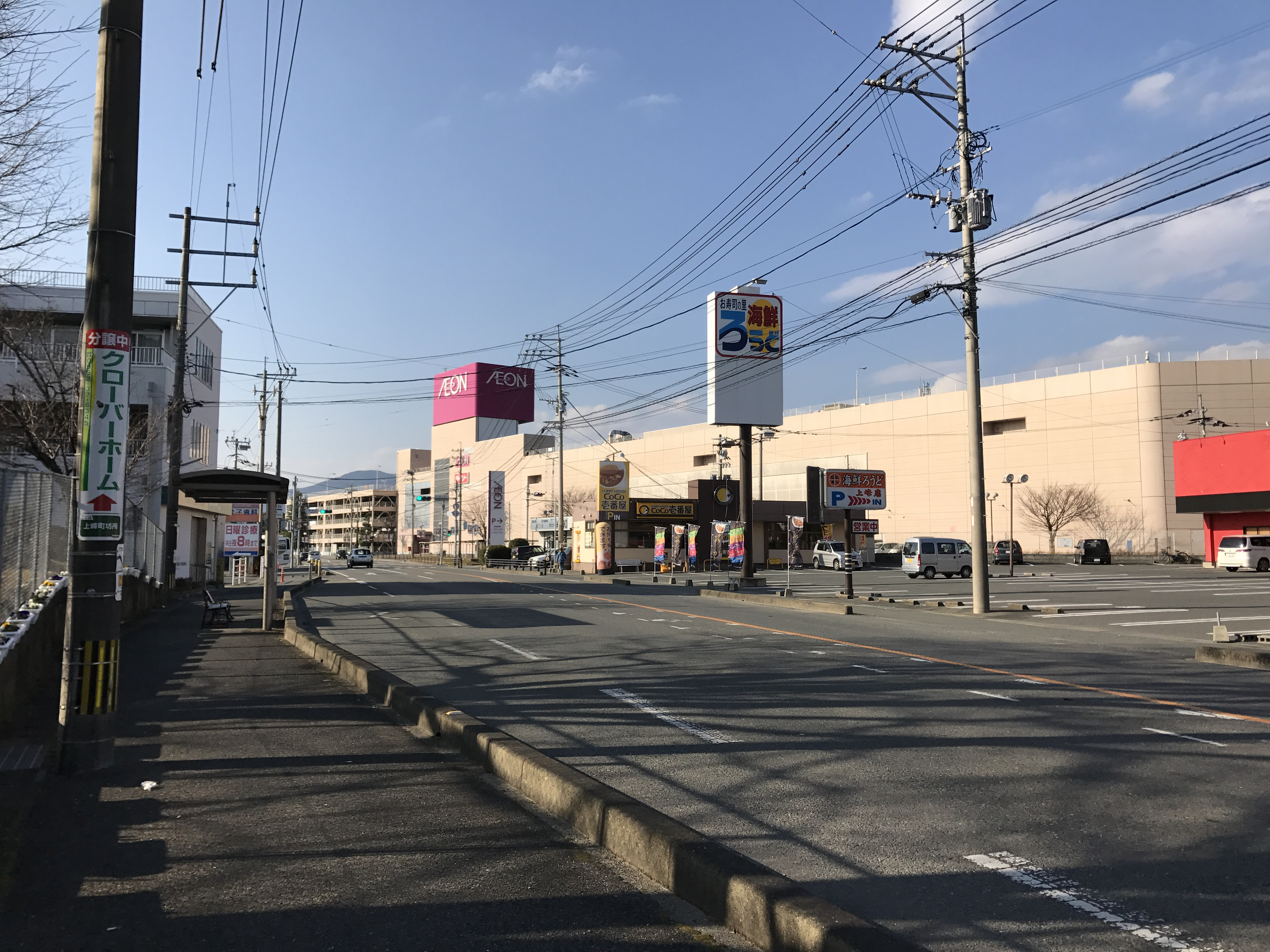 佐賀県三養基郡上峰町の佐賀県道22号